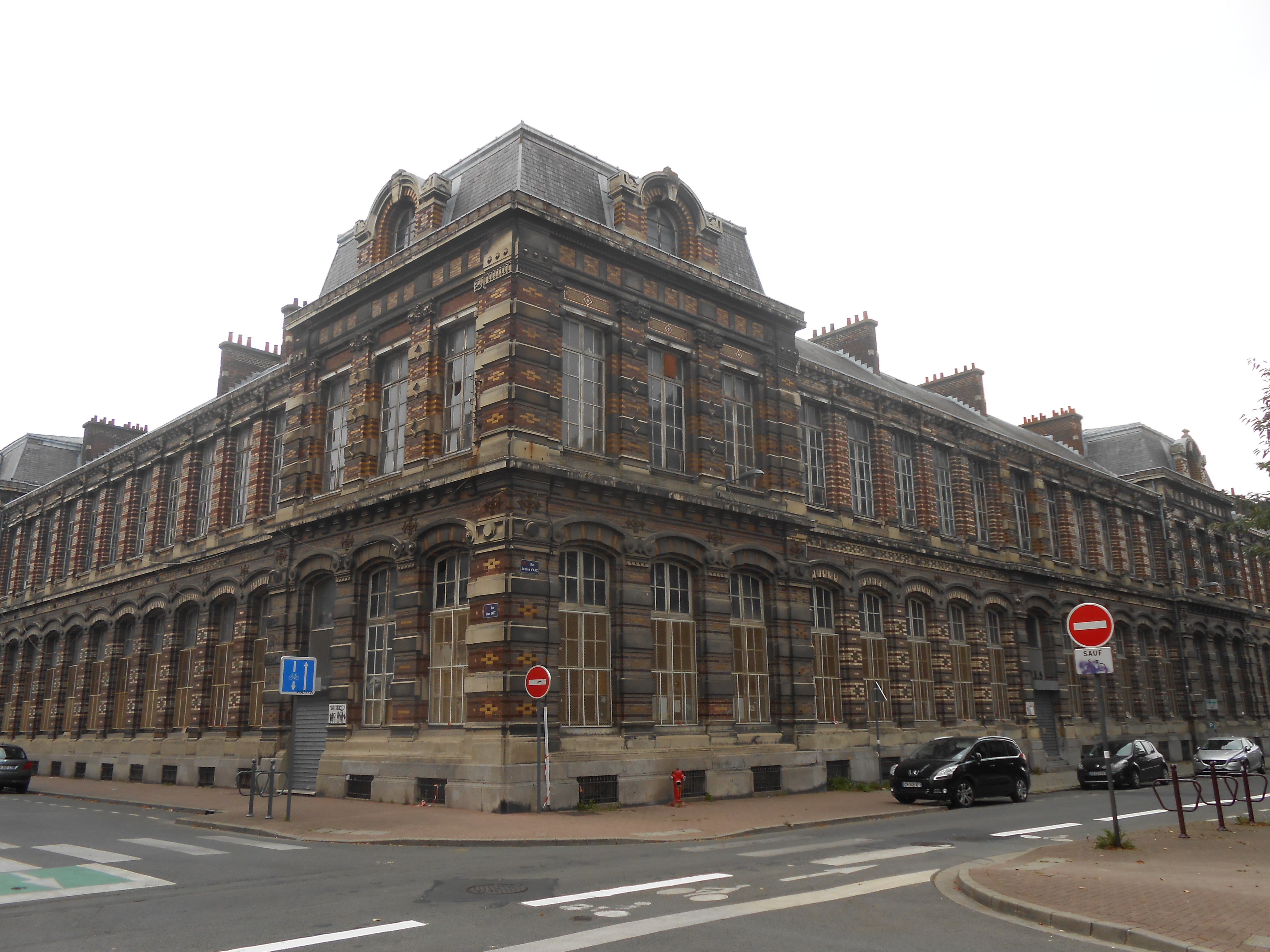 Université de Lille, rue Jeanne d'Arc et rue Jean Bart, F-59000 Lille, France